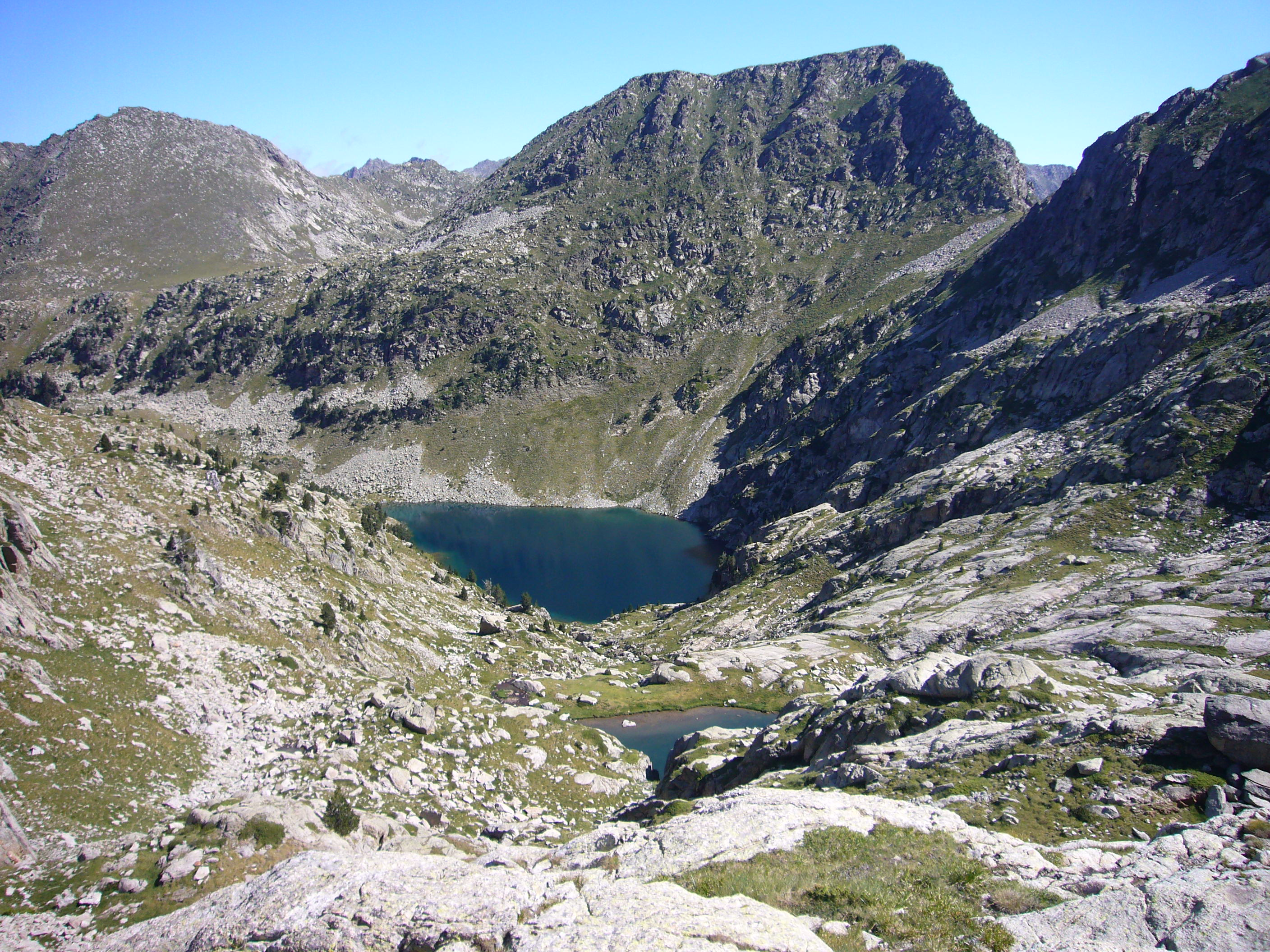 Estany Nere; la Vall de Boí, Espot, Pallars Sobirà, Catalunya